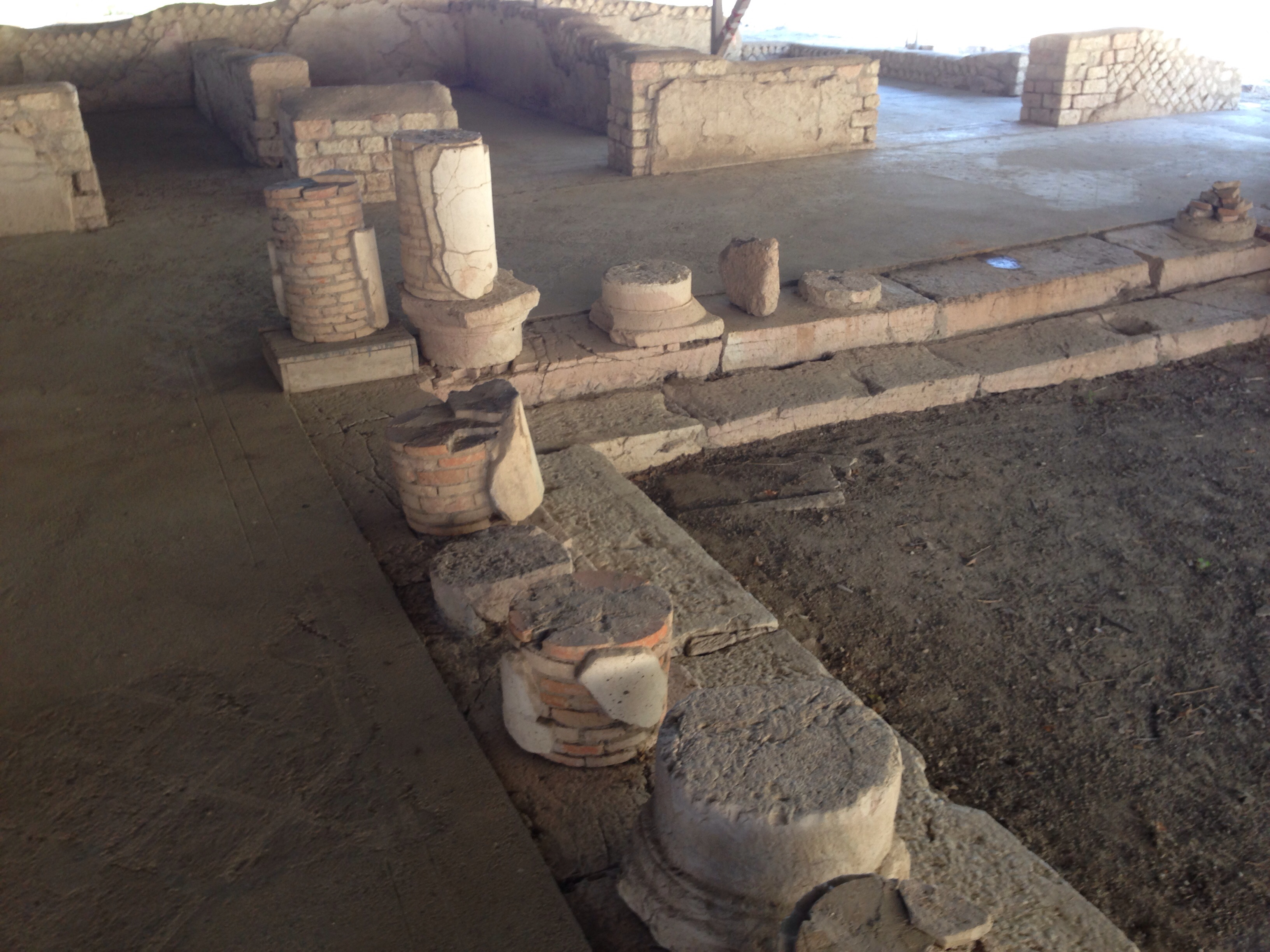 Villa romana di Cottanello. Peristilio con frammenti di colonne in muratura